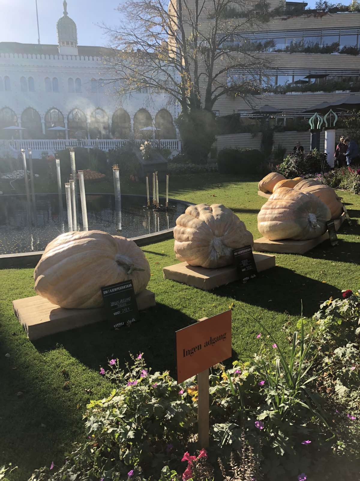 унутрашњост парка